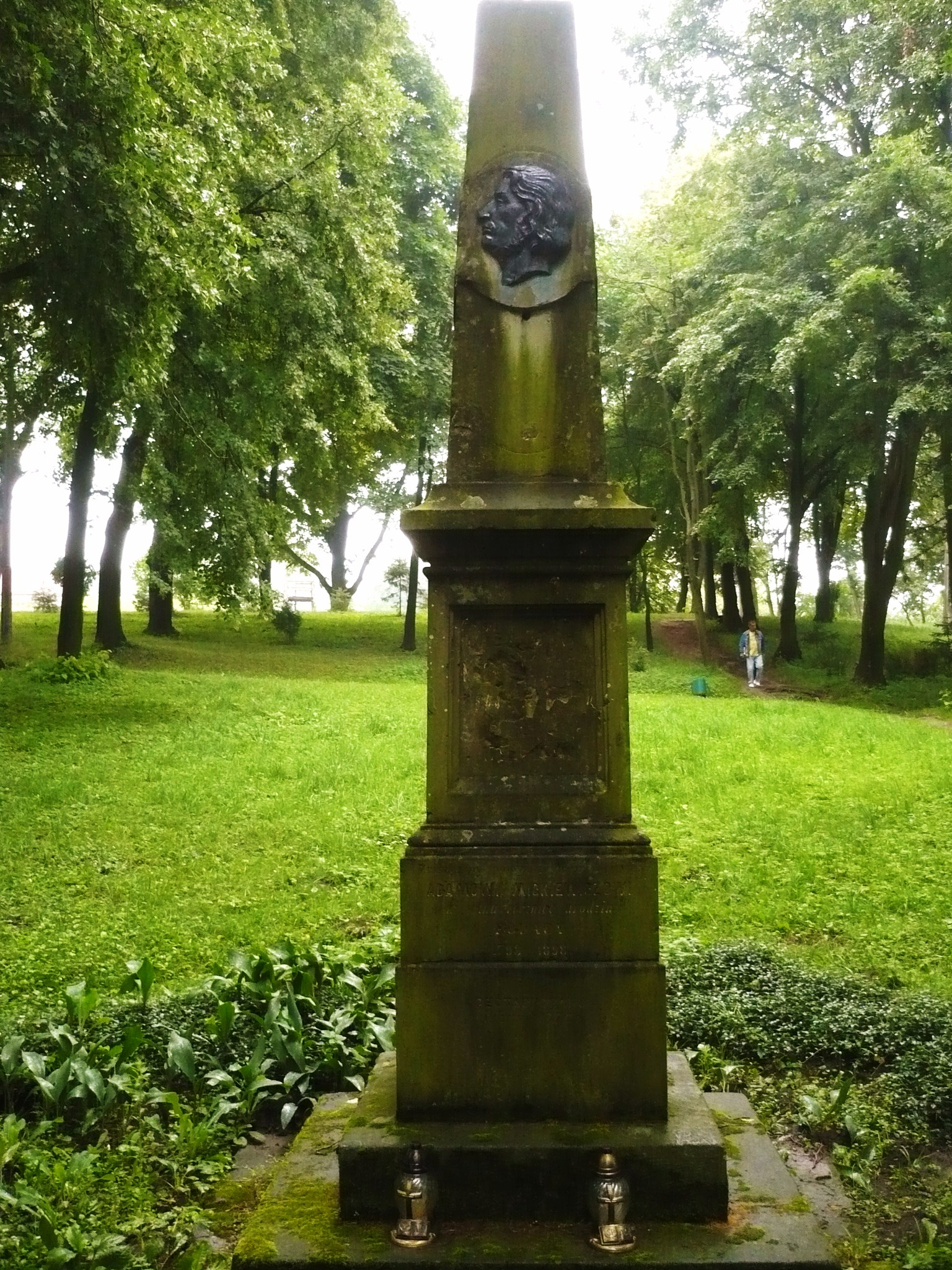 Zbaraż, pomnik Mickiewicza